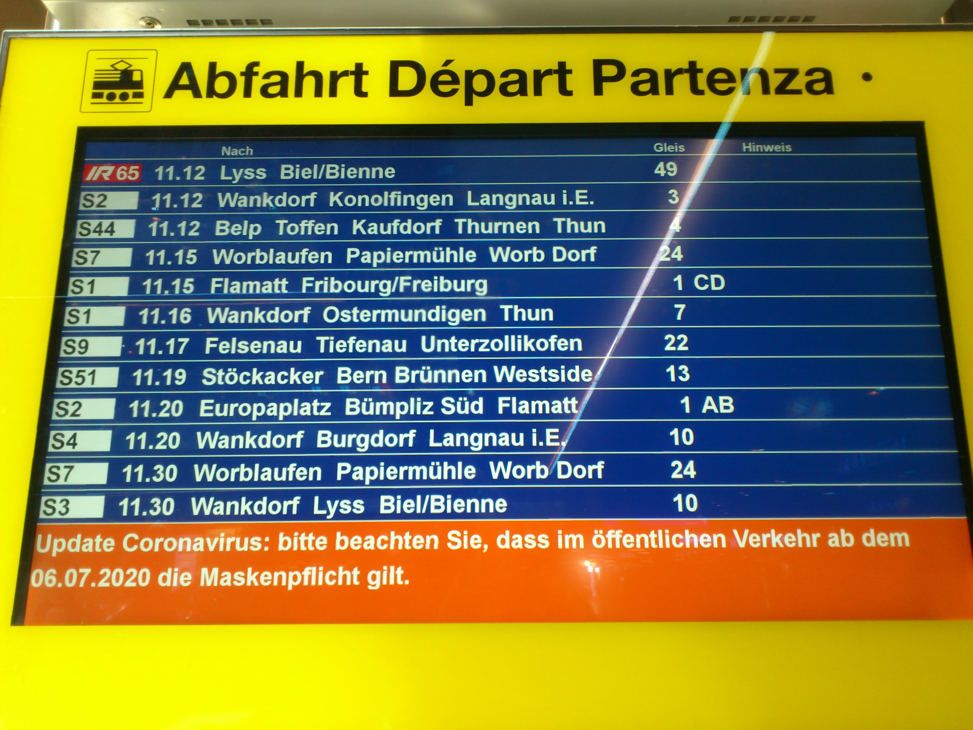 COVID-19 Bahnbetrieb SBB Schweiz. Abfahrtstafel mit dem Hinweis: "Update Coronavirus: bitte beachten Sie, dass im öffentlichen Verkehr ab dem 06.07.2020 die Maskenpflicht gilt."